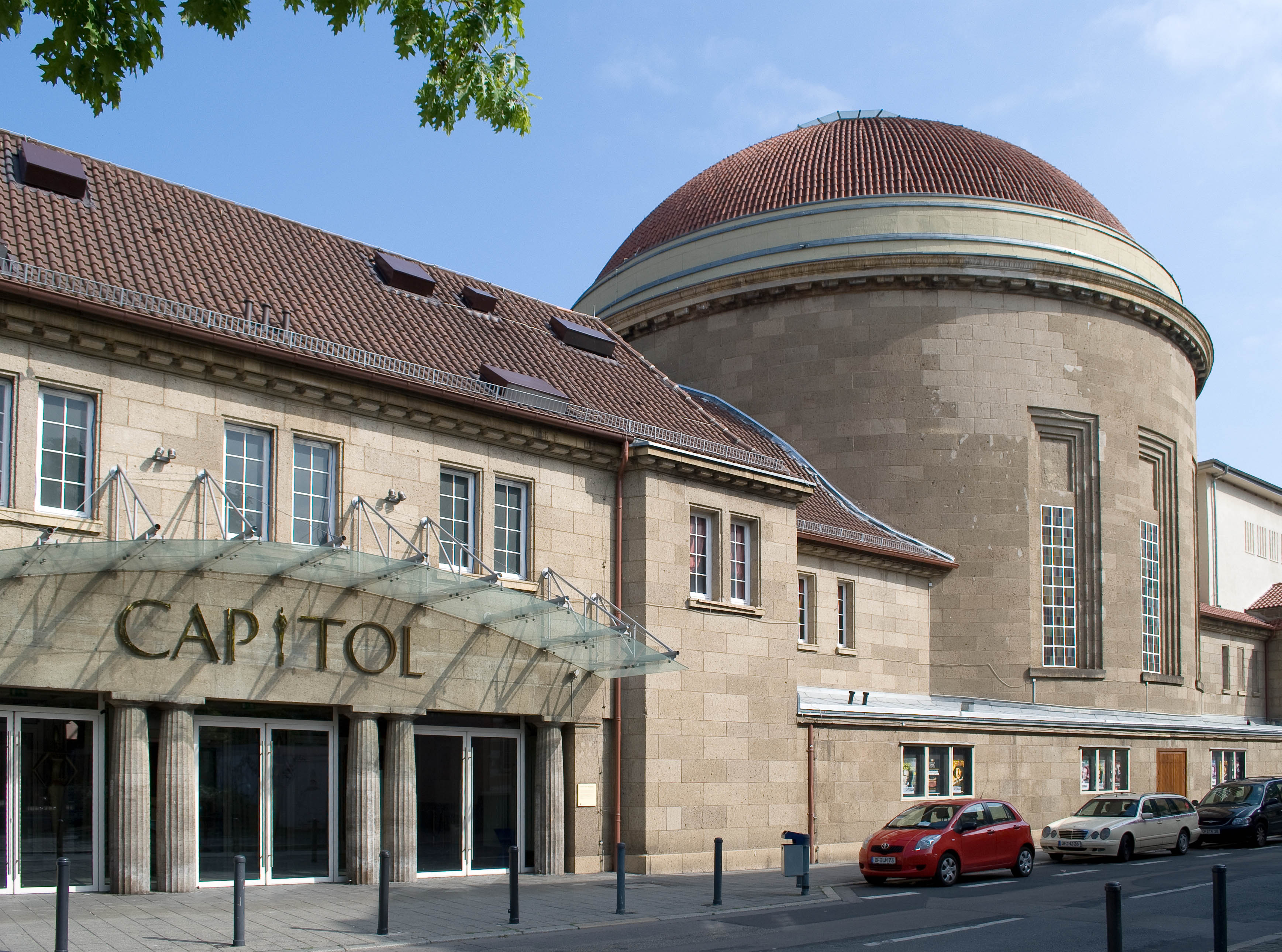 Das Capitol in Offenbach am Main ist die ehemalige Synagoge der Stadt und heute ein Kultur- und Veranstaltungszentrum.